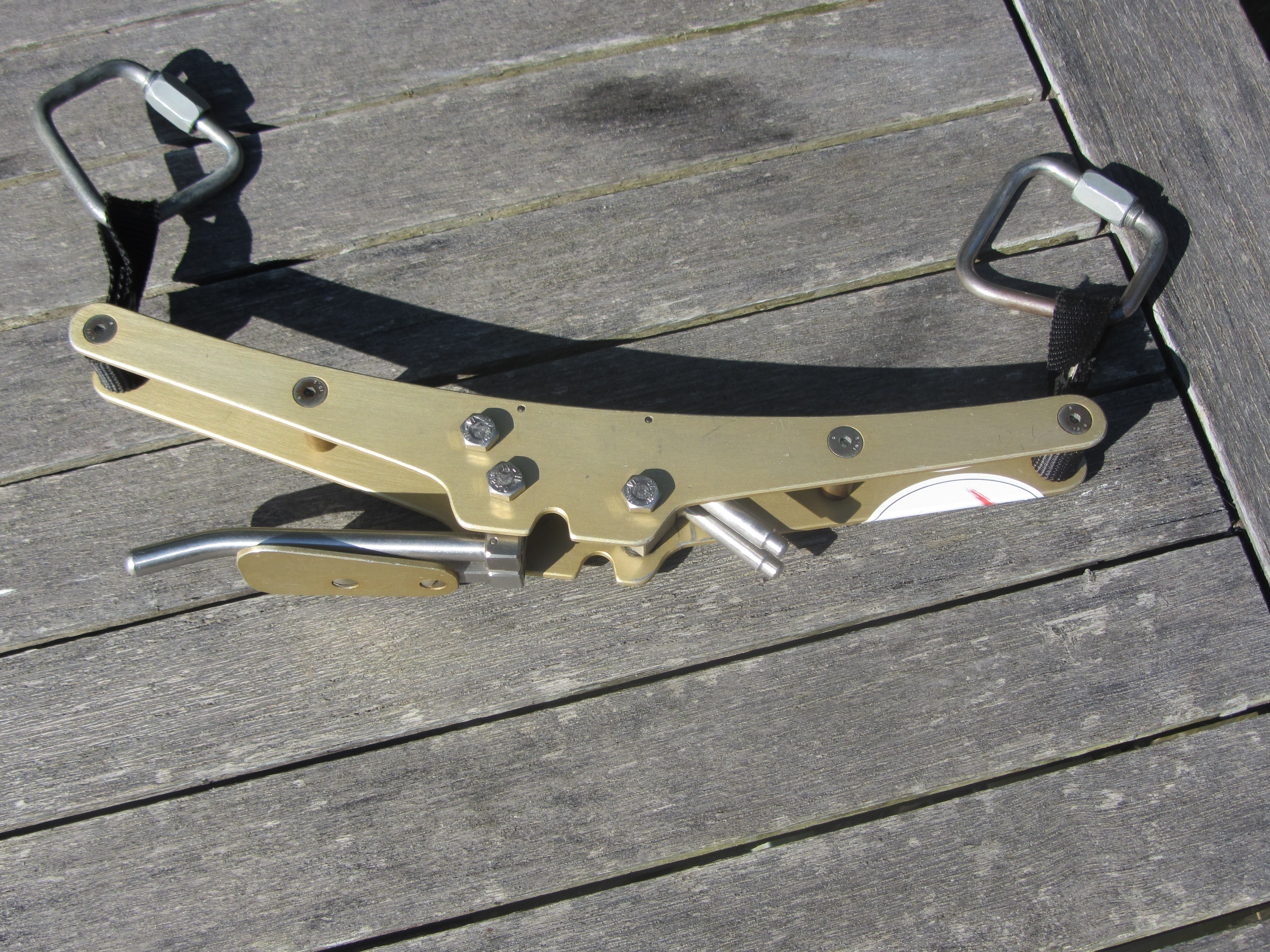 Spreizrohklinke für Gleitschirmflieger